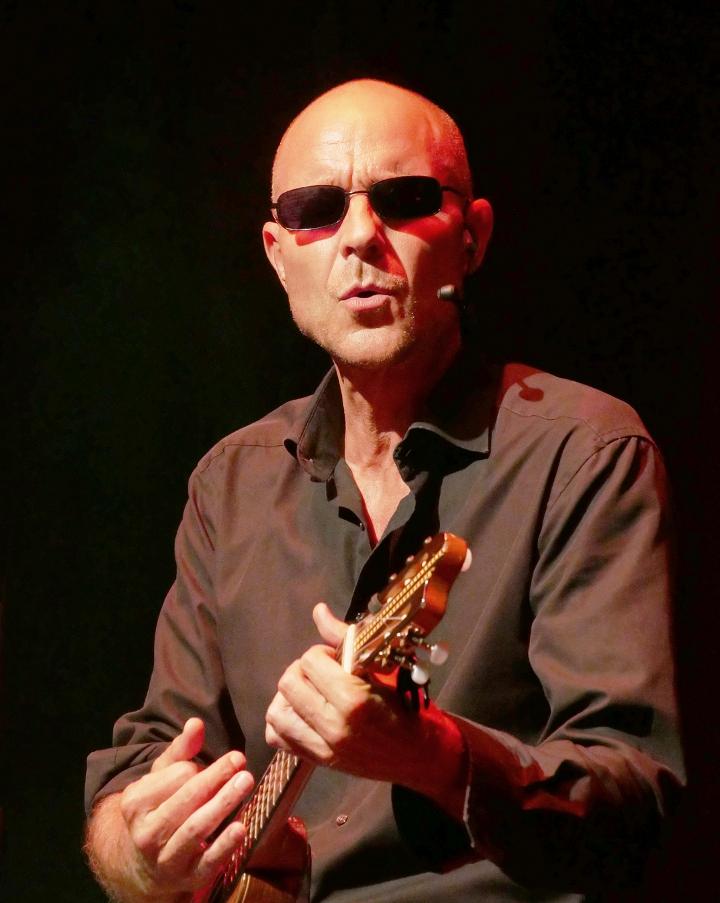 Mathias Zeh 'C' am 02.08.2017 in Herborn